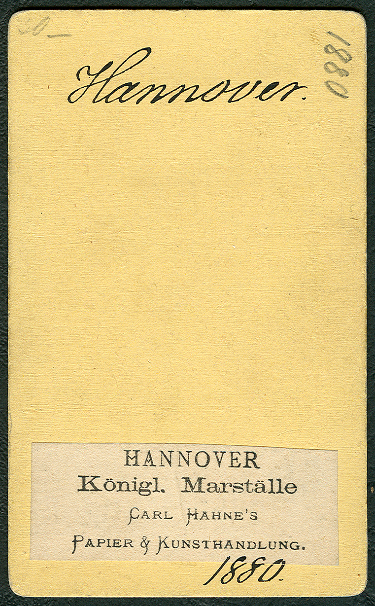 „Adressseite“ (Revert) der Carte de Visite mit einem Papier-Aufkleber mit Aufdruck „Hannover, Marstall beim WelfenschlossCarl Hahne's Papier & Kunsthandlung“, handschriftlich von Unbekannt datiert „Hannover, 1880“. ...